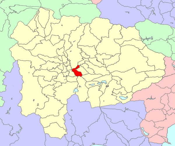 山梨県東八代郡中道町の位置画像。